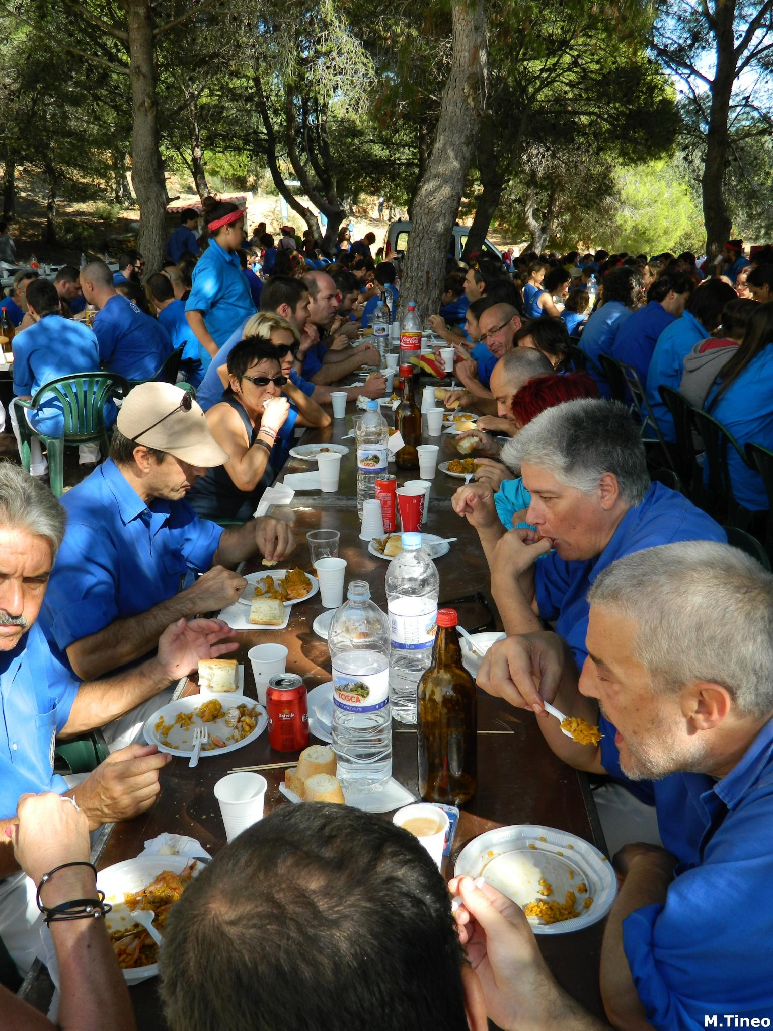 Castellers d'Esplugues amb Xiqüelos del Delta. Foto: Manel Tineo